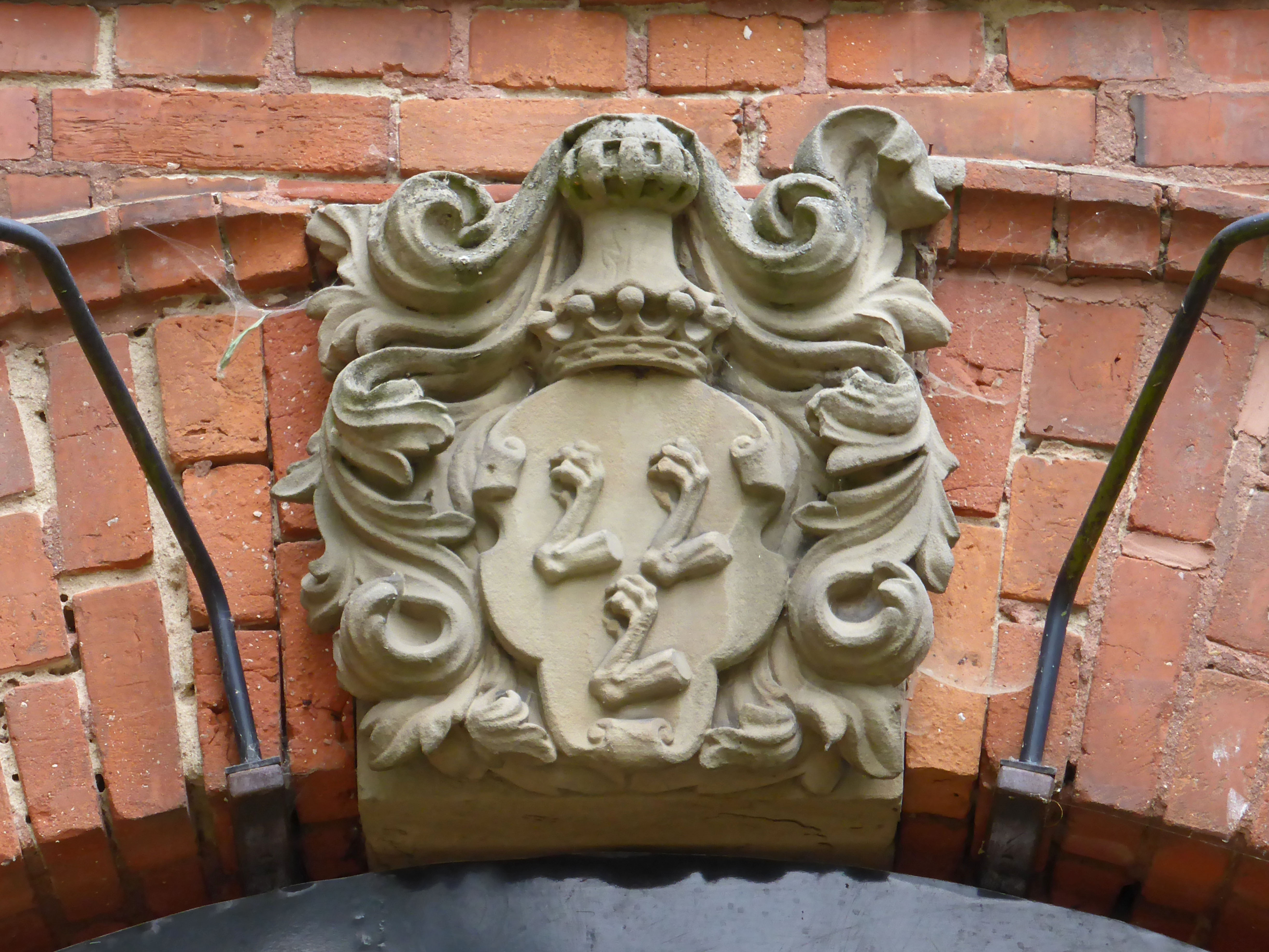 Wappenstein der Familie von der Schulenburg am ehemaligen Gräflichen Schloss in Beetzendorf.